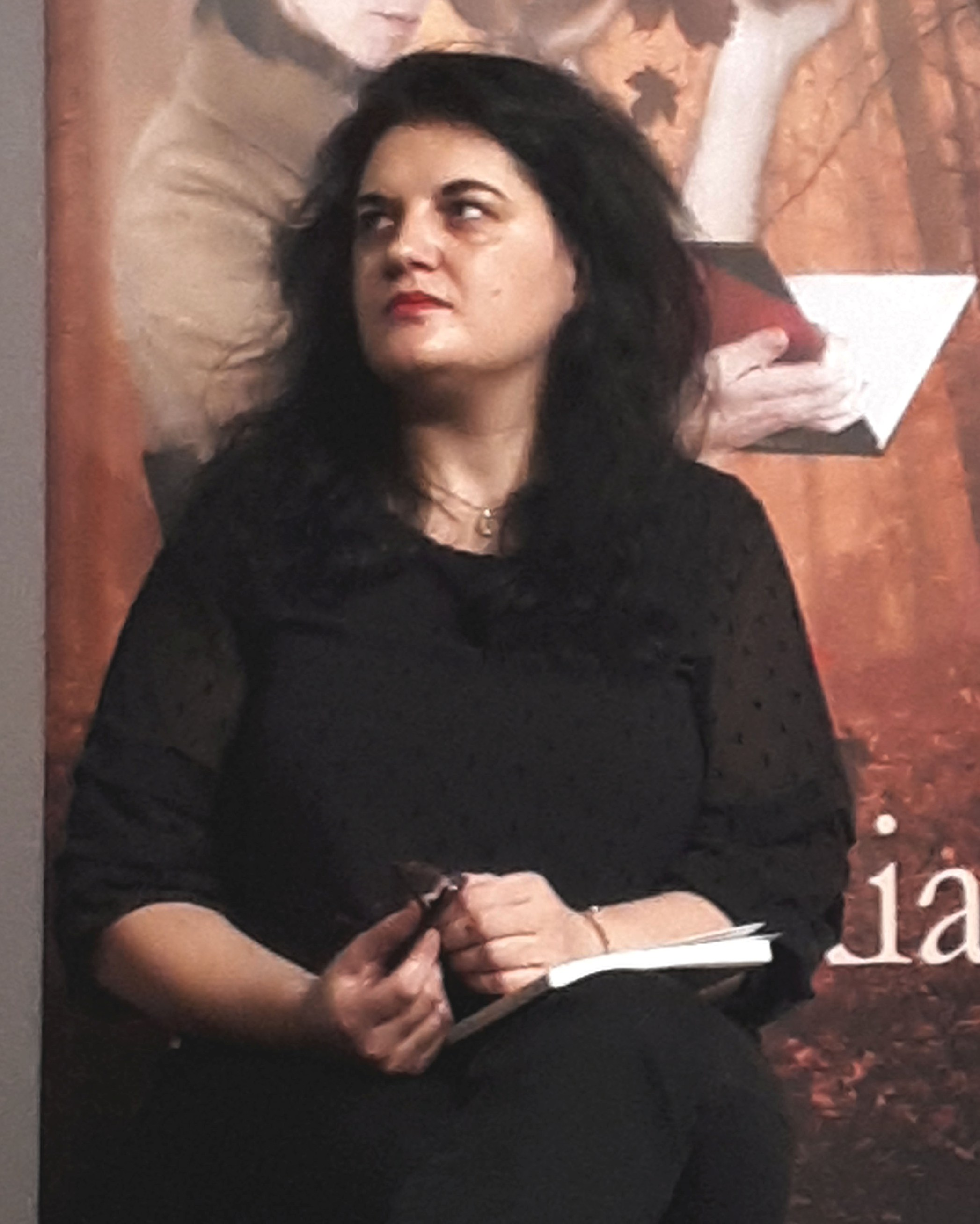 Olga Novo no festival Poemaria 2019 diante do cartaz, coa imaxe de Silva Penas, poetas galegas. Recital poético no Instituto Camoes (Centro Cultural Portugués) de Vigo.